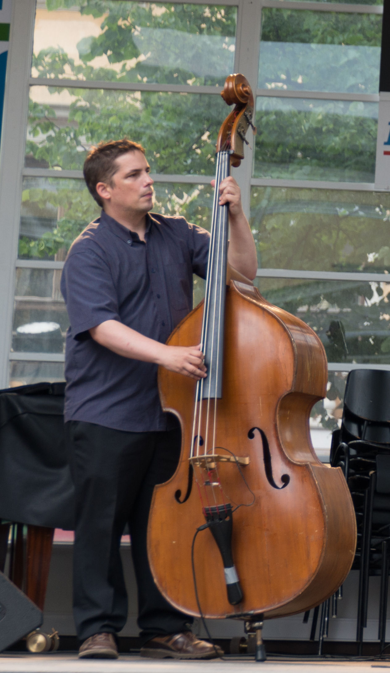 Timo Tuppurainen suomalainen basisti